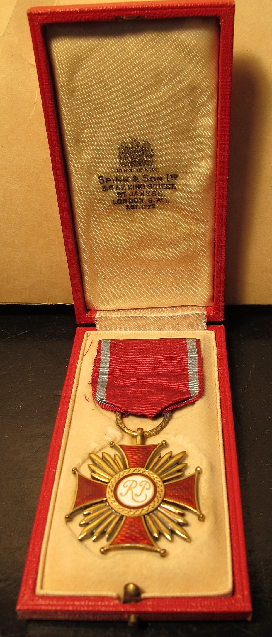 המדליה הוענקה לקליגלר בשם הממשלה הפולנית הגולה בשנת 1943, על ידי הקונסול הפולני בירושלים. 'צלב ההצטיינות' ניתן על תרומת קליגלר לפיתוח תרכיב חיסון לעזרה רפואית לפליטים פולנים תוך גילוי אומץ לב כשהזריק לעצמו את התרכיב